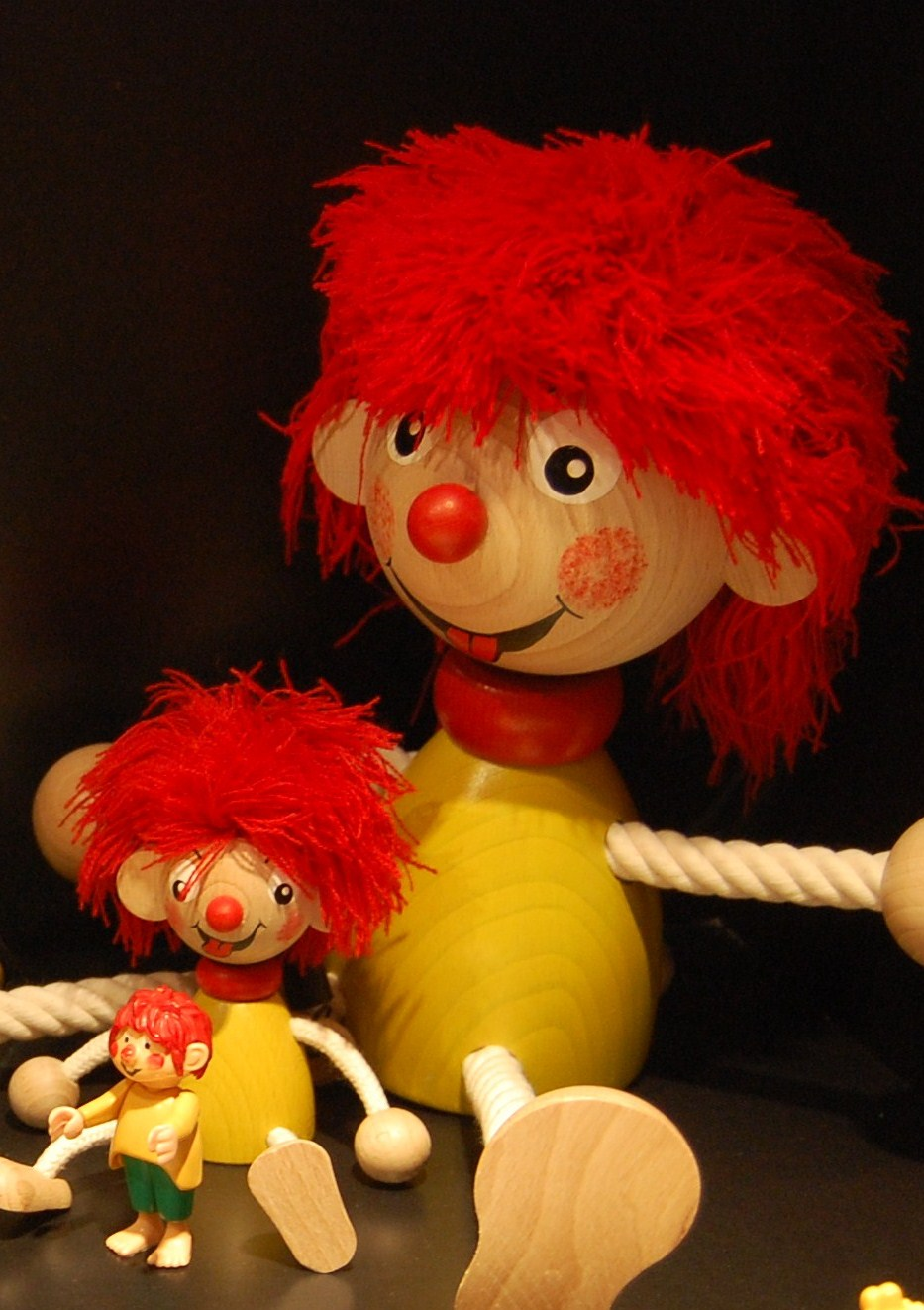 Pumuckl-Puppen; ausgestellt in der "Spielzeugwelt (Bad Kissingen)"